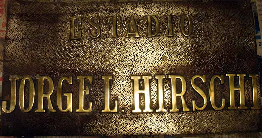 Antigua plaqueta colocada en el viejo portón central de ingreso al Estadio Jorge Luis Hirschi del Club Estudiantes de La Plata, en avenida 1 y 55. La placa identificatoria estuvo colocada hasta la demolición definitiva del estadio en 2008.